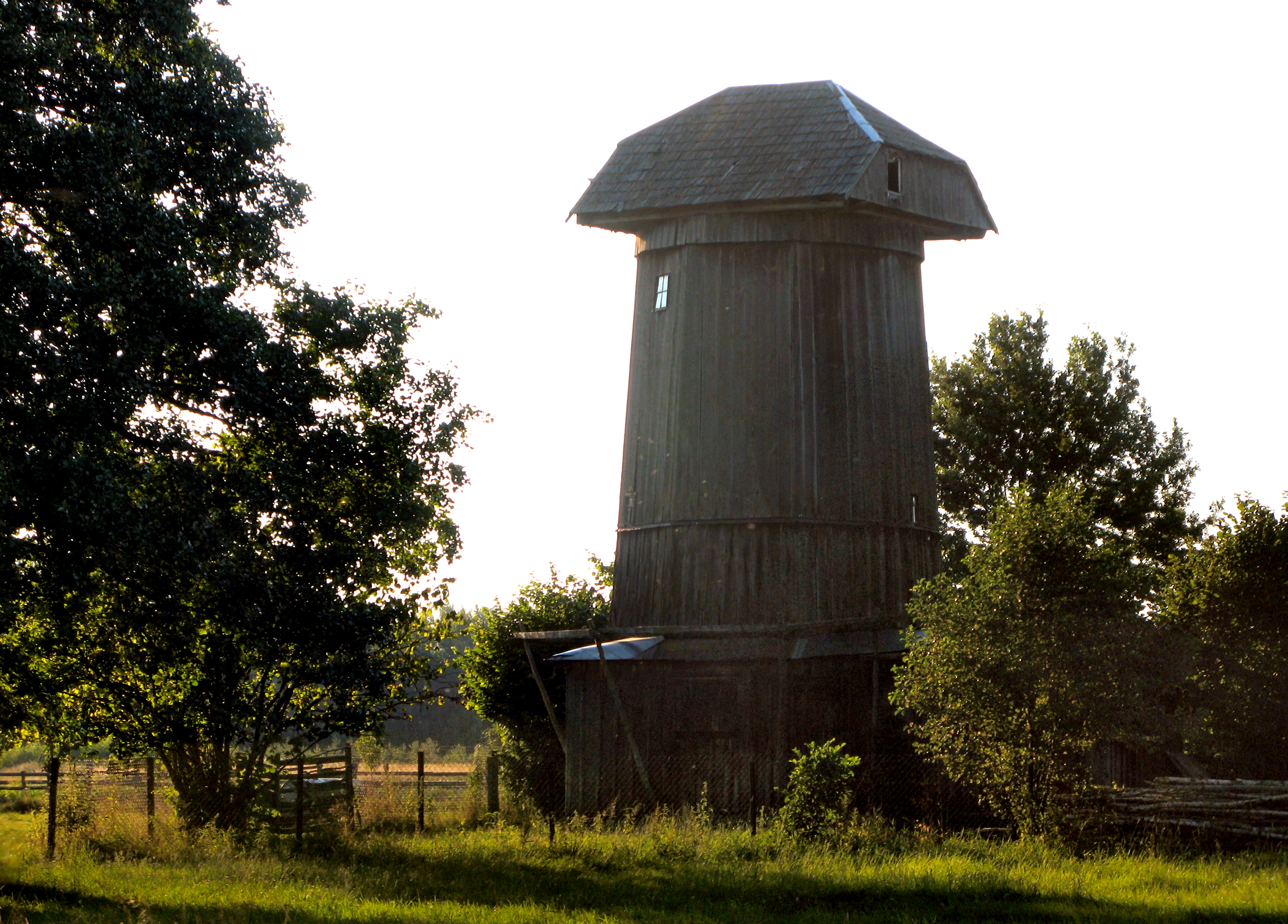 Wiatrak holender, drewn., 1948 Koryciski, Dubicze Cerkiewne 11.1979.